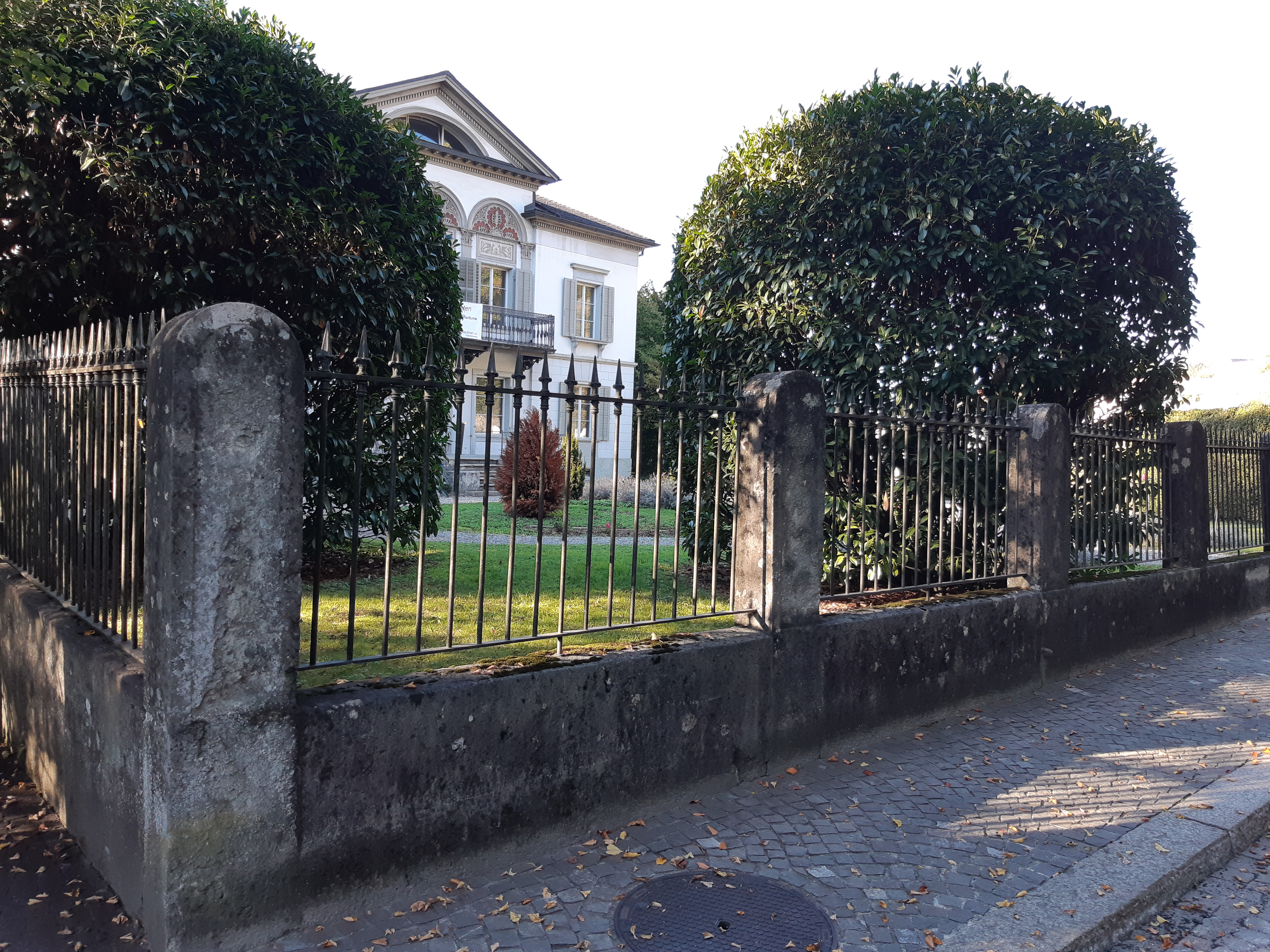 Schützenmattstrasse mit Villa Malaga, in Lenzburg (Switzerland)